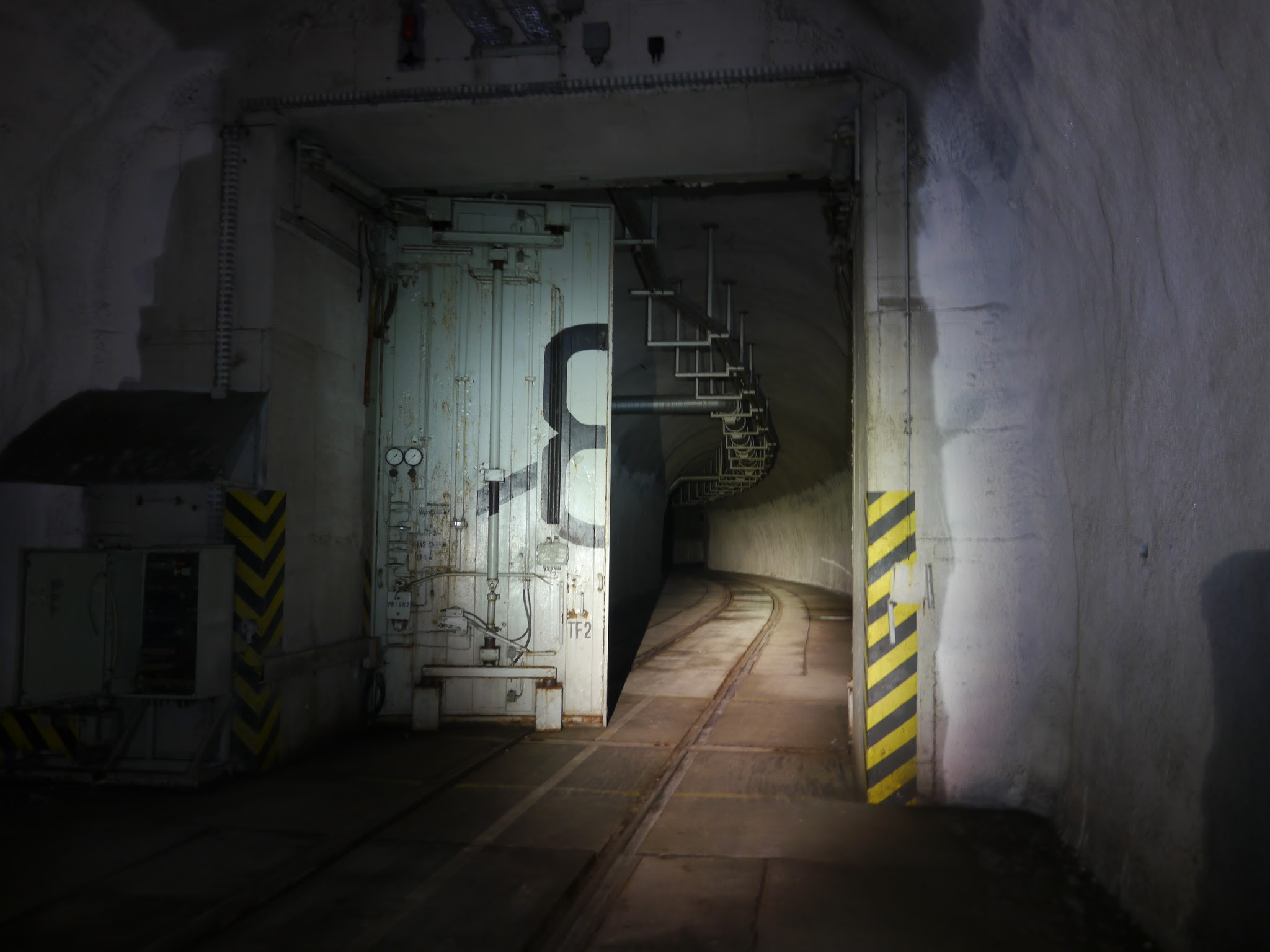 Drucktor in Komplexlager 12 mit Eisenbahn Normalspur